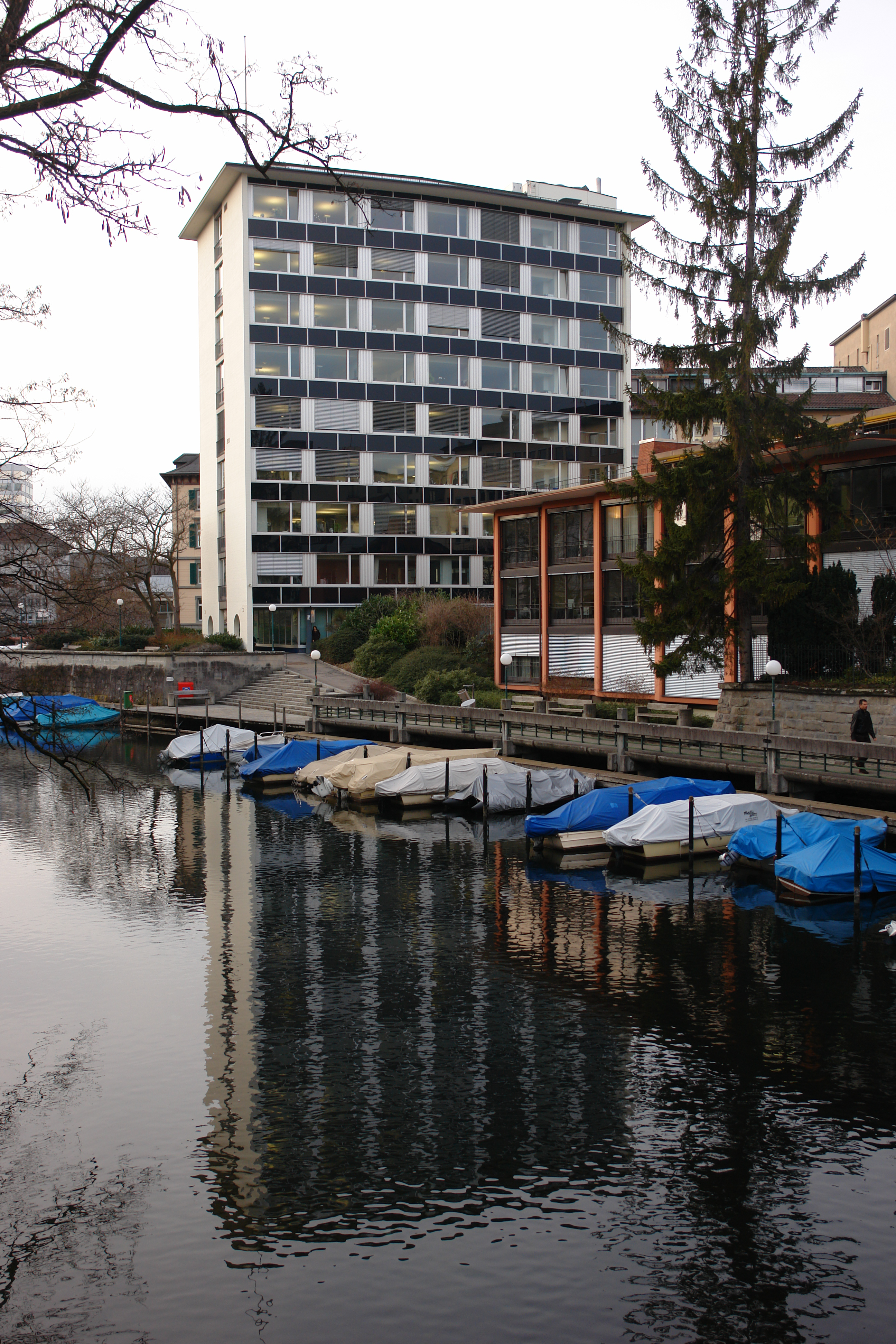 Geschäftshaus Zur Bastei, auch Hochhaus am Schanzengraben. Hochhaus 1953-55, Appartementhaus (rechts) 1953-54 Architekt: Werner Stücheli